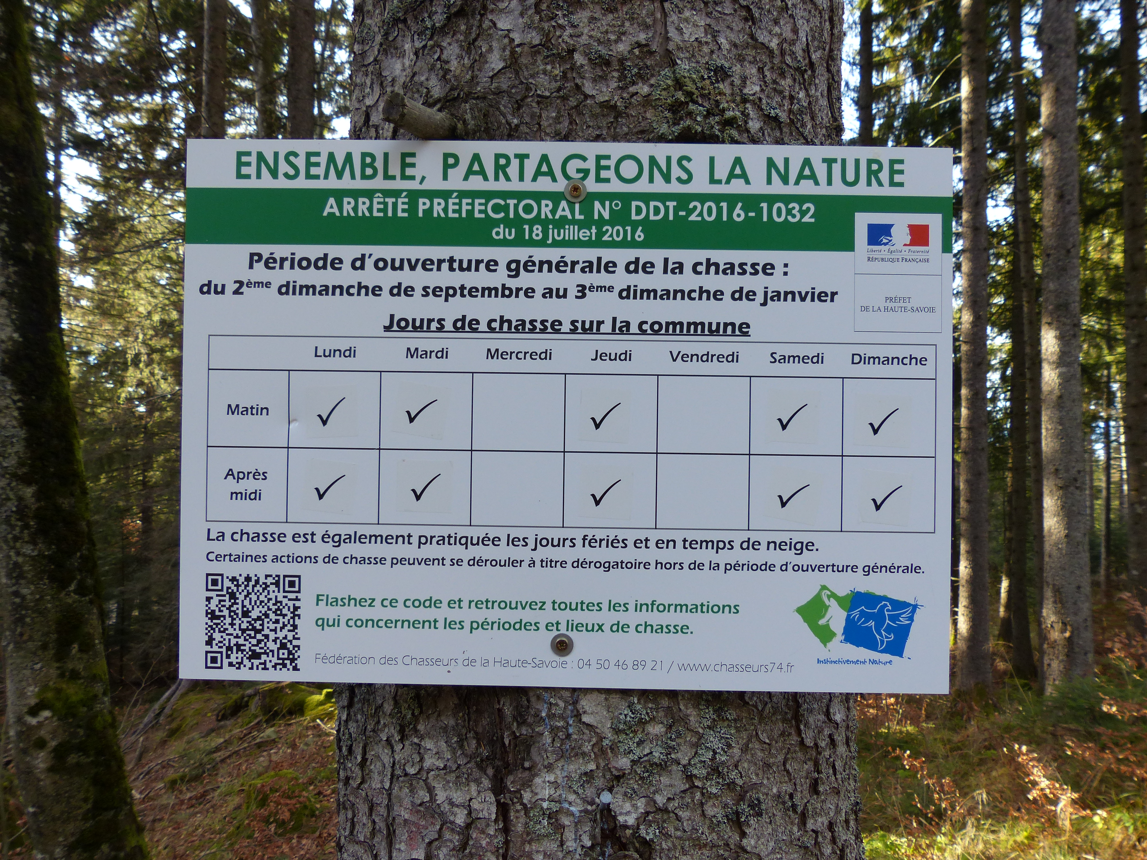 Affiche en forêt, montagne des Voirons, Lucinges, Haute-Savoie, France. Inscriptions sur l'affiche: Ensemble, partageons la nature Arrêté préfectoral n° DDT-2016-1032 du 18 juillet 2016 Période d'ouverture générale de la chasse: du 2ème dimanche de septembre au 3ème dimanche de janvier Jours de chasse sur la commune Lundi matin et après-midi, mardi matin et après-midi, jeudi matin et après-midi, samedi matin et après-midi, dimanche matin et après-midi. La chasse est également pratiquée les jours fériés et en temps de neige. Certaines actions de chasse peuvent se dérouler à titre dérogatoire hors des la période d'ouverture générale. Flashez ce code et retrouvez toutes les informations qui concernent les périodes et lieux de chasse. Fédération des Chasseurs de la Haute-Savoie: 04 50 46 89 21 /